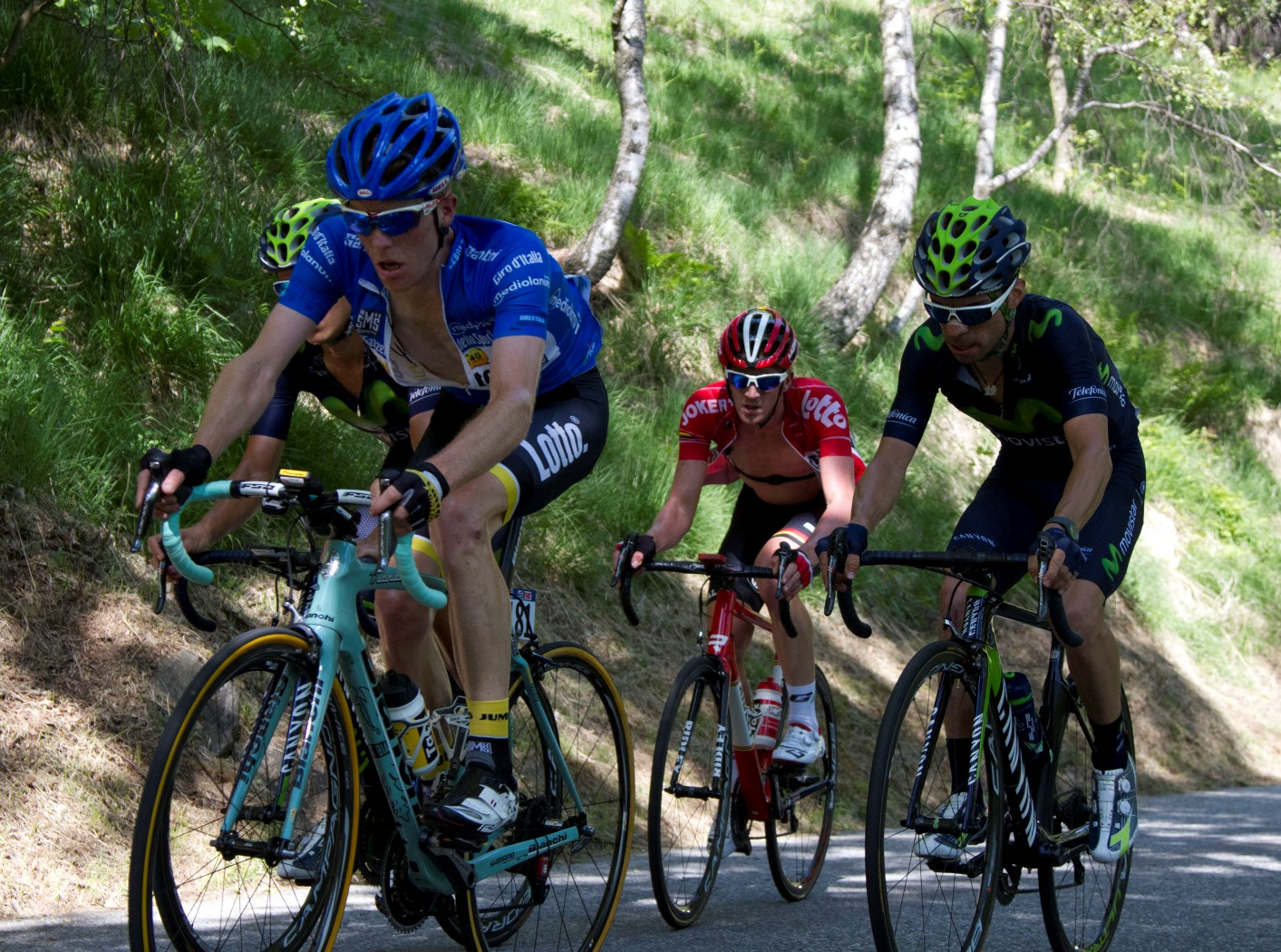 284 kruiswijk vdb amador